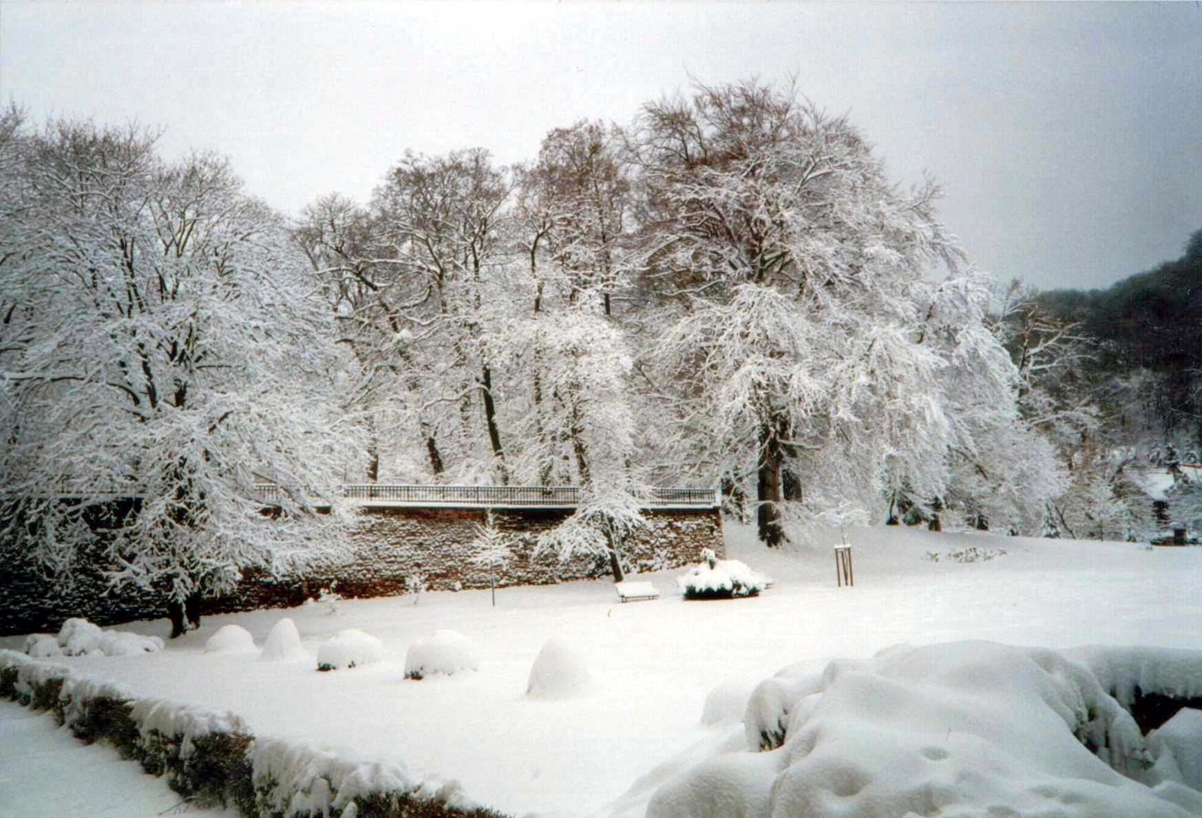 Winterlicher Lustgarten in Wernigerode